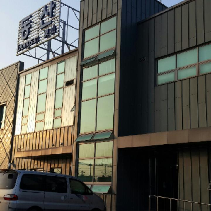 동산역 신 역사 (선로측)